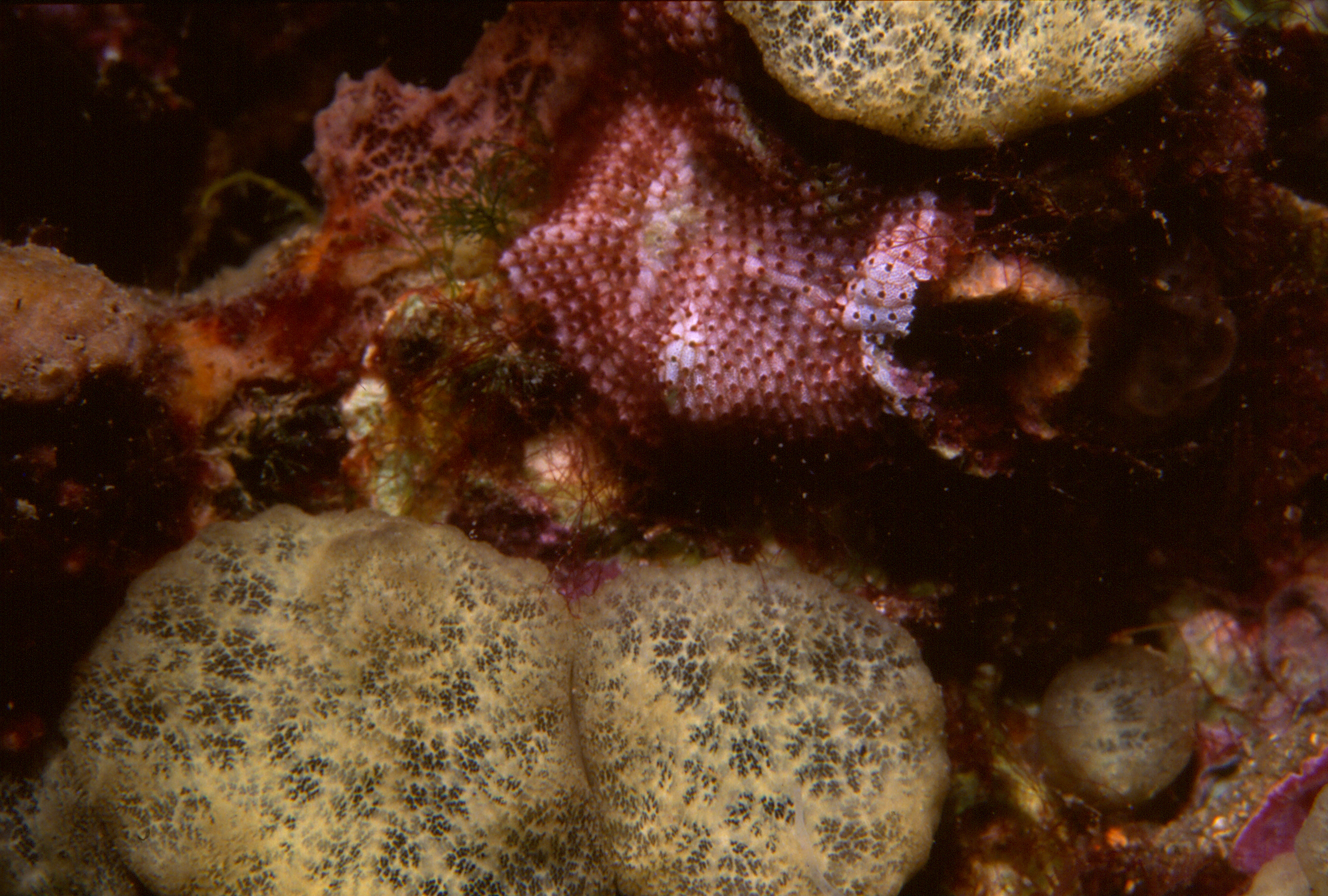 Cliona viridis (Schmidt, 1862) - Banyuls-sur-Mer : 07/89